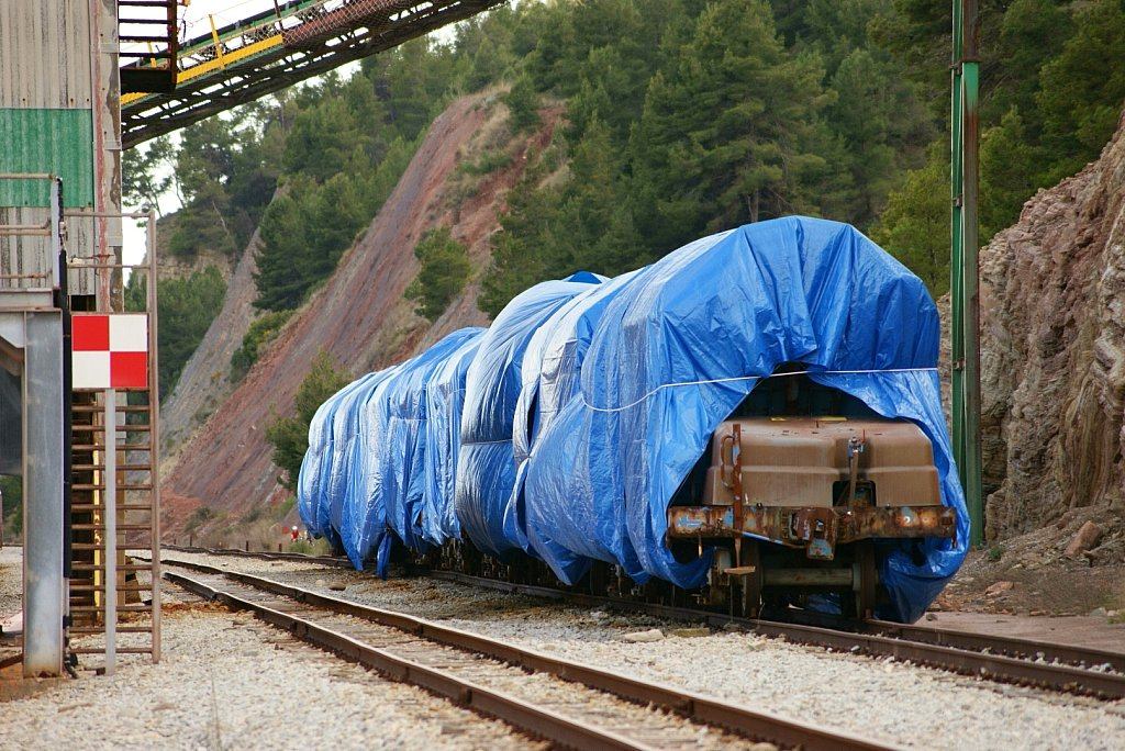 Per complementar la foto pujada ahir, avui li toca a una foto realitzada recentment. Després d'un avís de Sergio que havia vist unes tremuges molt lluents a Sallent, em vaig disposar a investigar una mica el tema i aquí està el resultat. Unes quantes tremuges que les han tapat amb lones, ja que estàn just a sota de la cinta transportadora de la potassa i s'estàn prejubilant allà mateix. Para complementar la foto subida ayer, hoy le toca a una foto realizada recientemente. Tras un aviso de Sergio que había visto unas tolvas muy relucientes en Sallent, me dispuse a investigar un poco el tema y aquí está el resultado. Unas cuantas tolvas que las taparon con lonas, ya que están justo debajo de la cinta transportadora de la potasa y se están prejubilando ahí mismo.